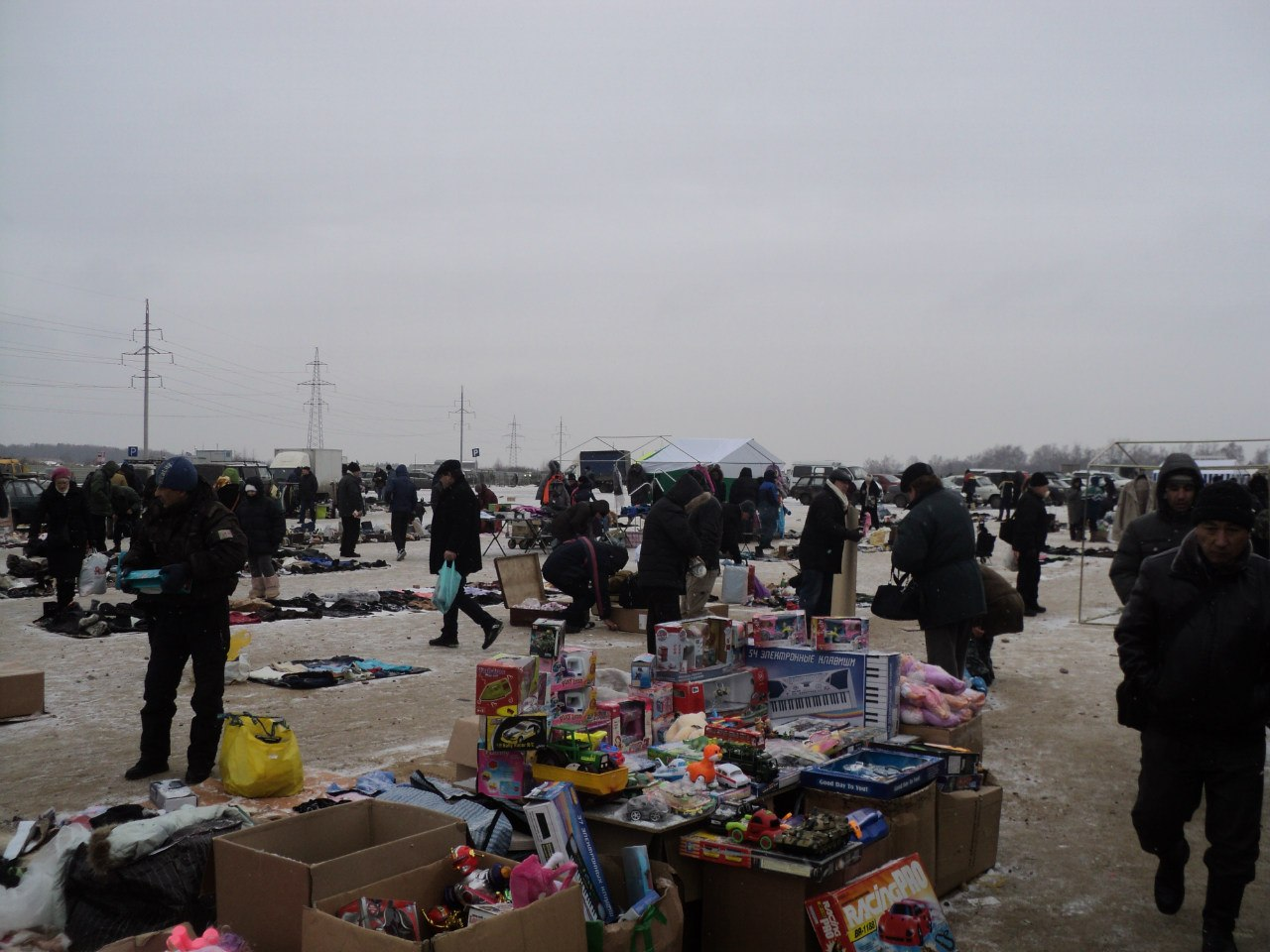 Блошиный рынок. Москва. Новоподрезково.